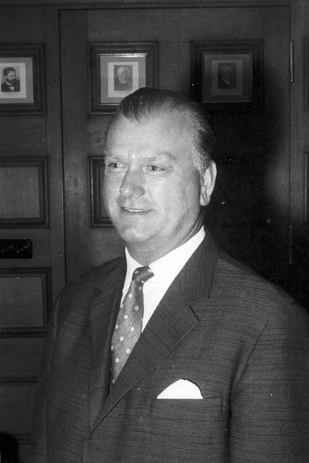 ist neuer FDP-Kreisvorsitzender Kiels.